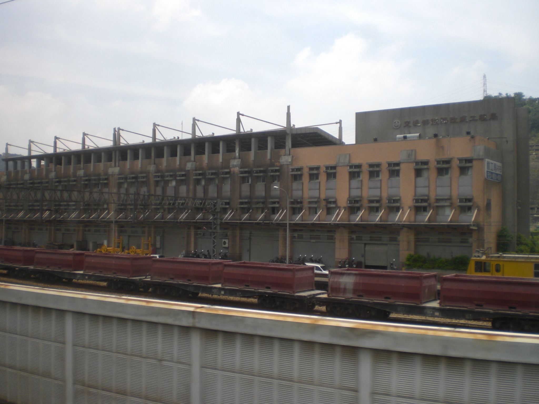 中華民國交通部鐵路改建工程局設於臺灣鐵路管理局五堵貨場旁的局舍。從臺灣鐵路管理局南下列車拍攝。